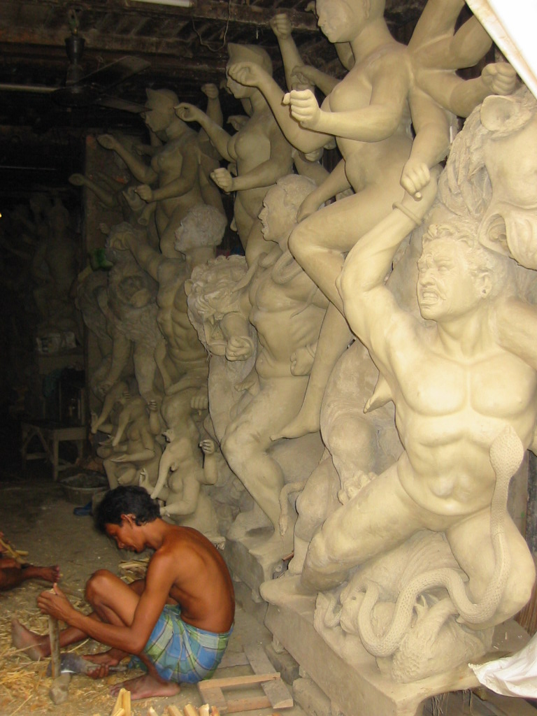 réalisation de grandes sculptures à armature de paille recouverte de terre séchée CALCUTTA métier tradition religion Inde India